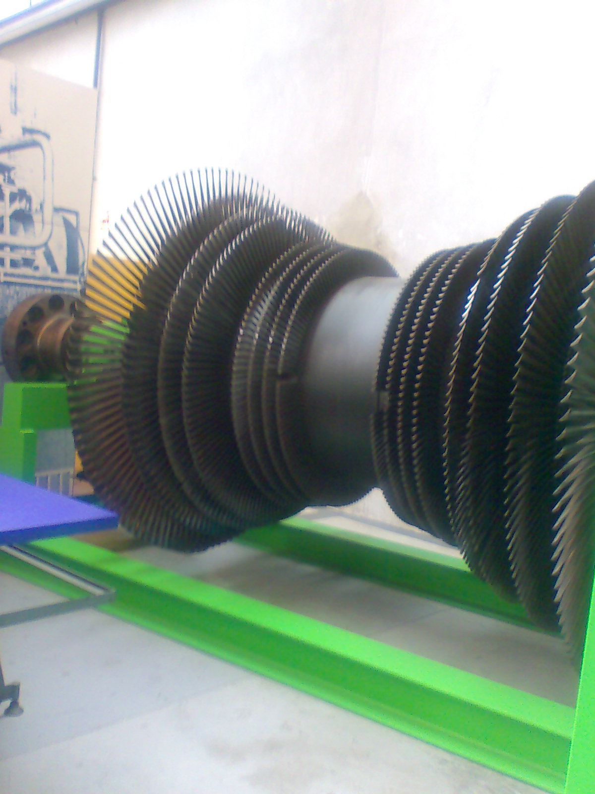 Turbina de vapor. Museo de la Técnica de Terrassa